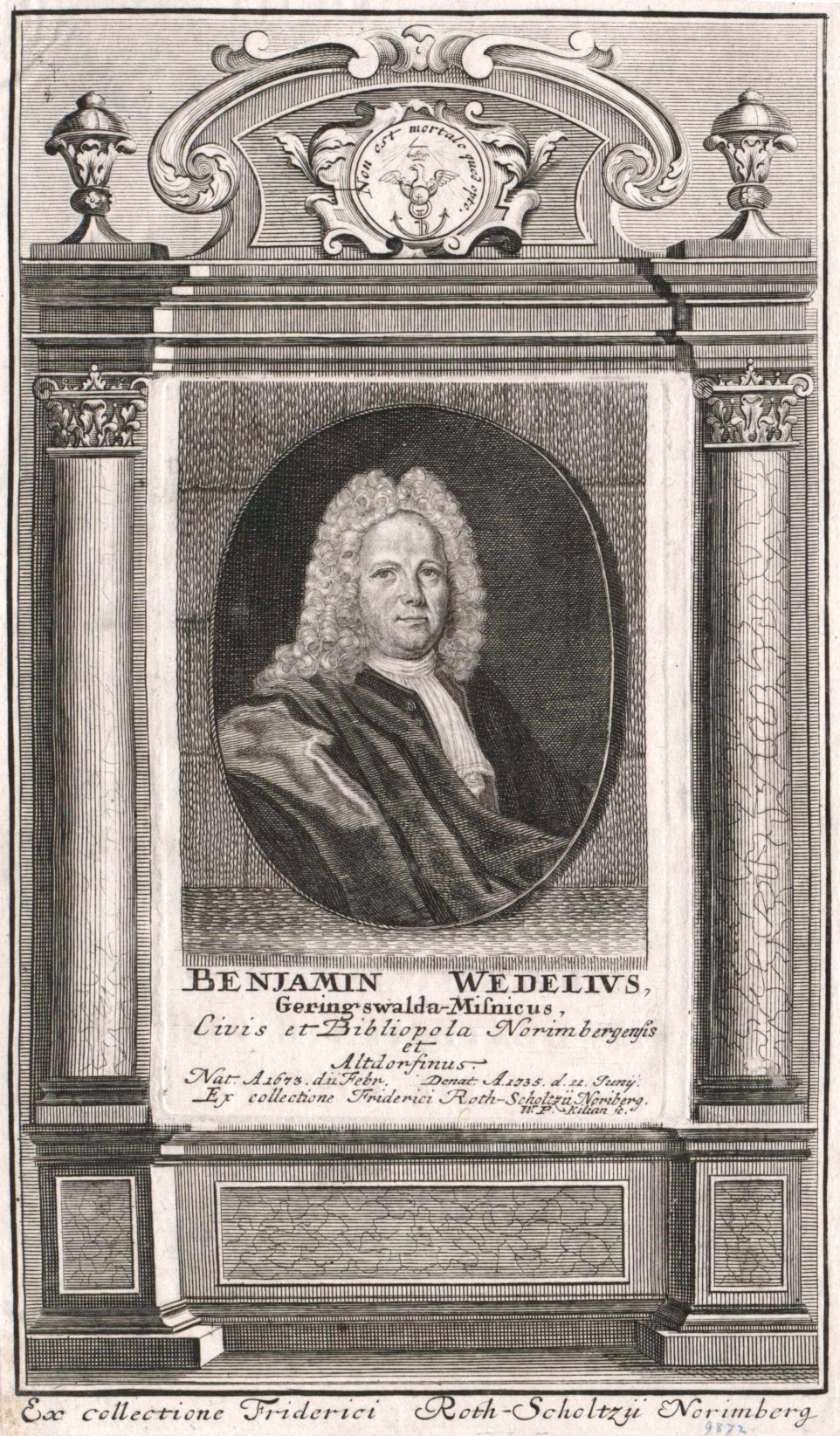 Benjamin Wedelius (1673–1736)